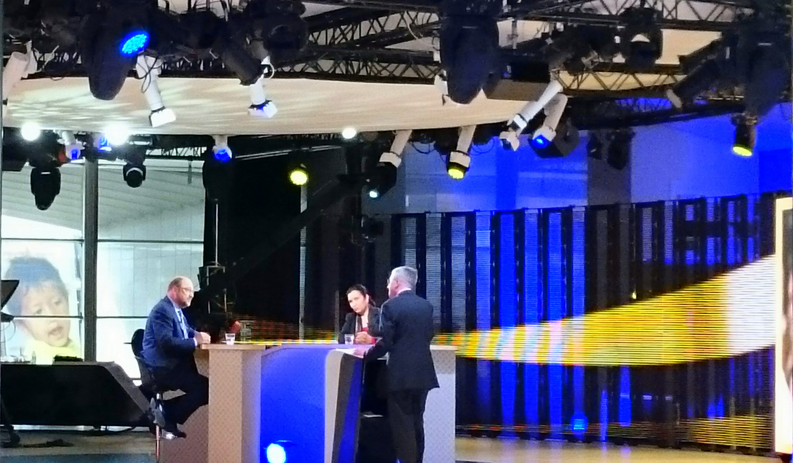 L'émission Le Bar de l'Europe sur le plateau du Parlement européen de Bruxelles. Émission diffusée sur TV5 Monde, en 2015. En présence de Martin Schulz et Salima Ghezali (prix Sakharov 1997).